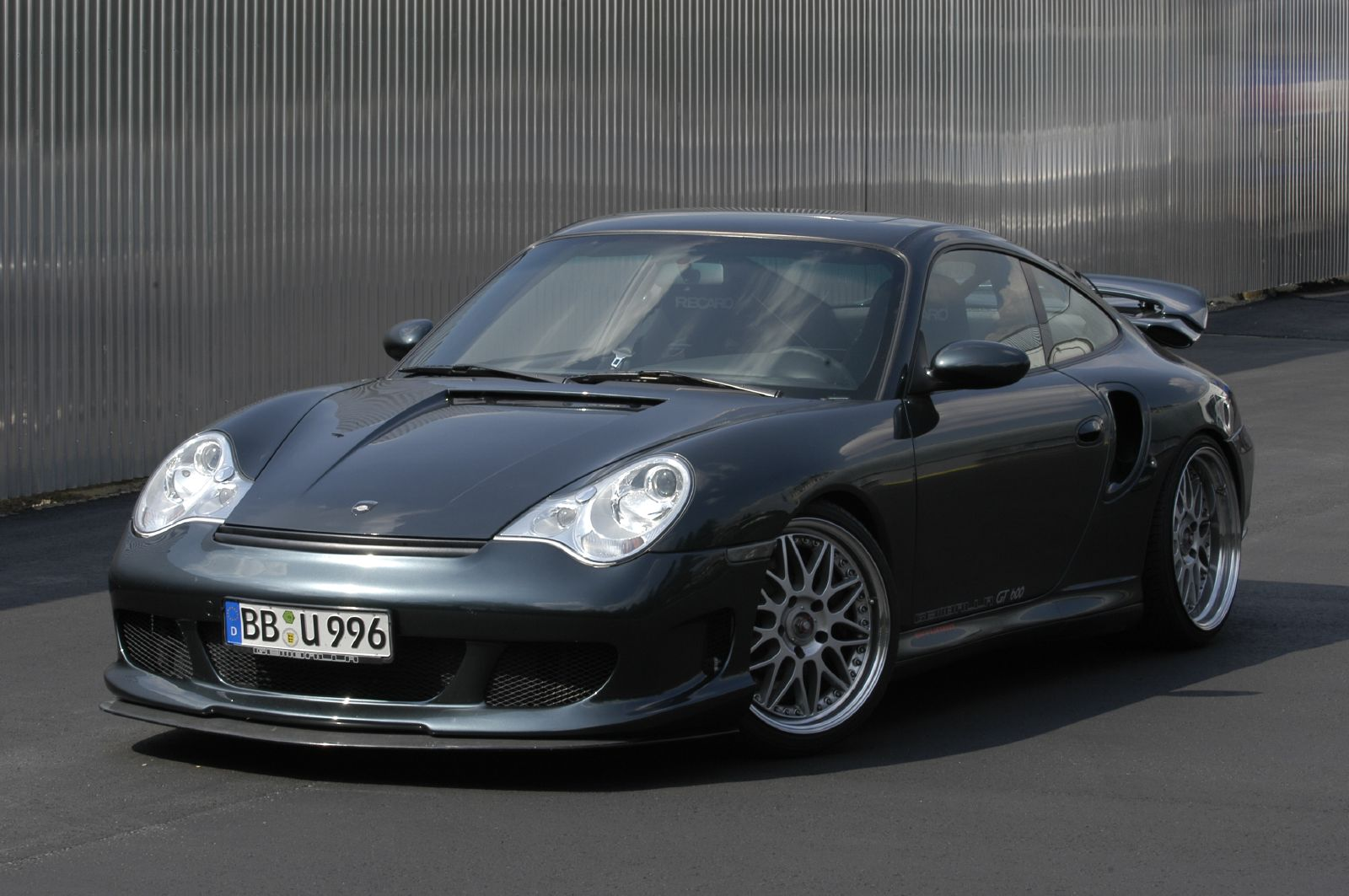 Gemballa 996 turbo 001.jpgGemballa 996 turbo